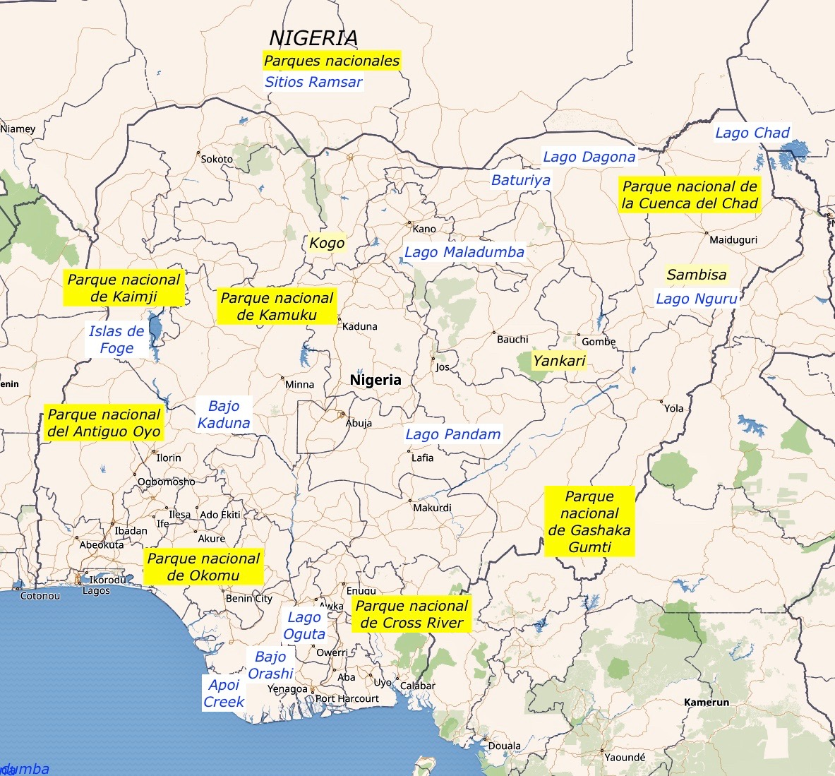 Mapa de los parquea nacionales de Nigeria y los sitios Ramsar a partir de un mapa de Wikimaps